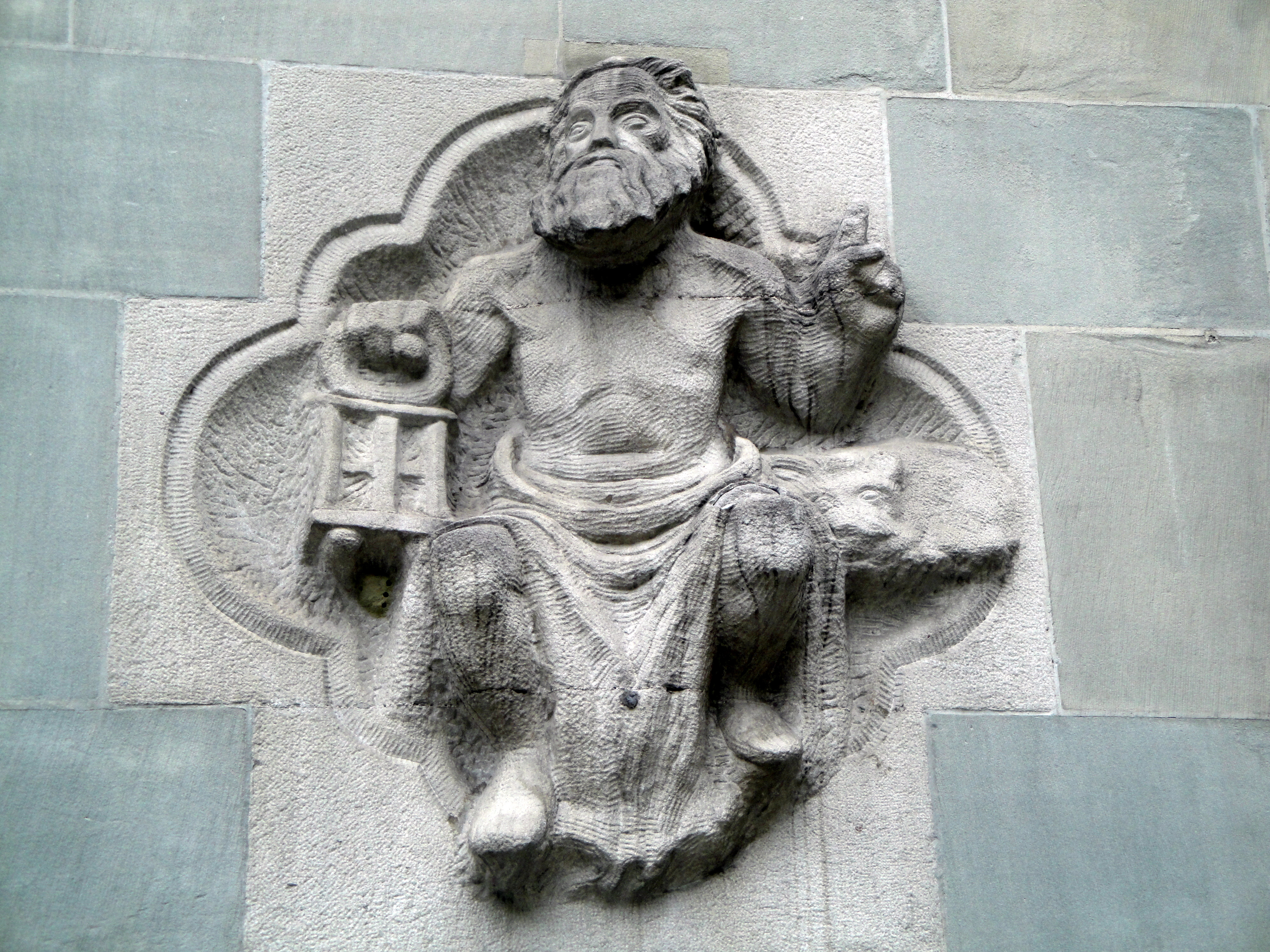 Bern, Rathaus, Diogenes, von Gustave Piguet, 1942 (Detail Südfassade).